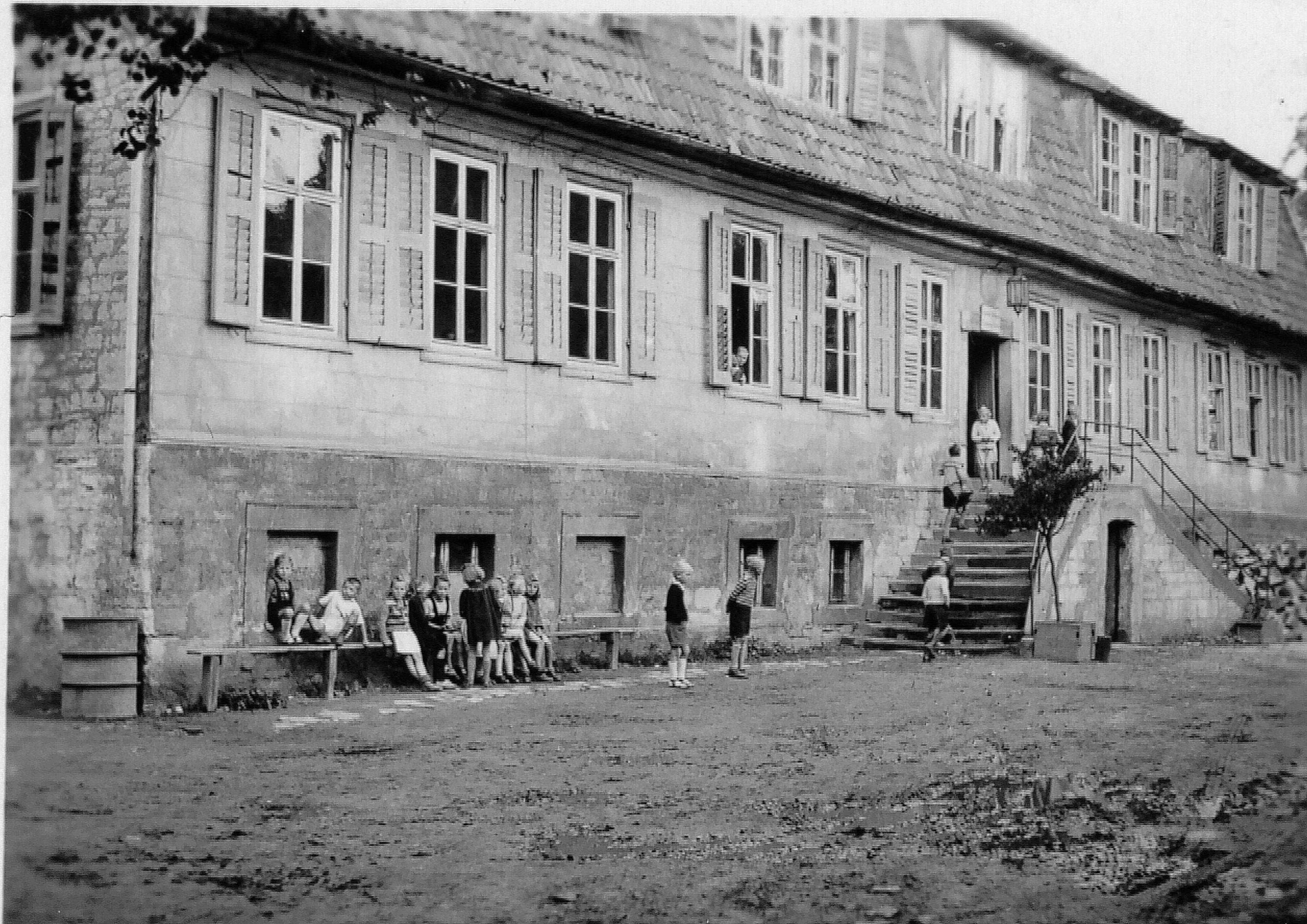 Schule in Haynrode (1948), bis 1945 Schloß derer von Klüchtzner, bis 1875 Schloß im Unterhof derer von Bültzingslöwen zu Haynrode